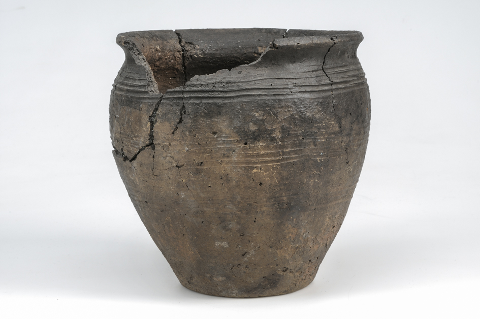 Vessel Ceramic Vipperrow ware. Slavic provenence. Grave find, Björkö, Adelsö, Uppland, Sweden. SHM 34000:Bj 1143